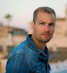 Jan Eric Schwarzer, ehem. deutscher Radrennfahrer